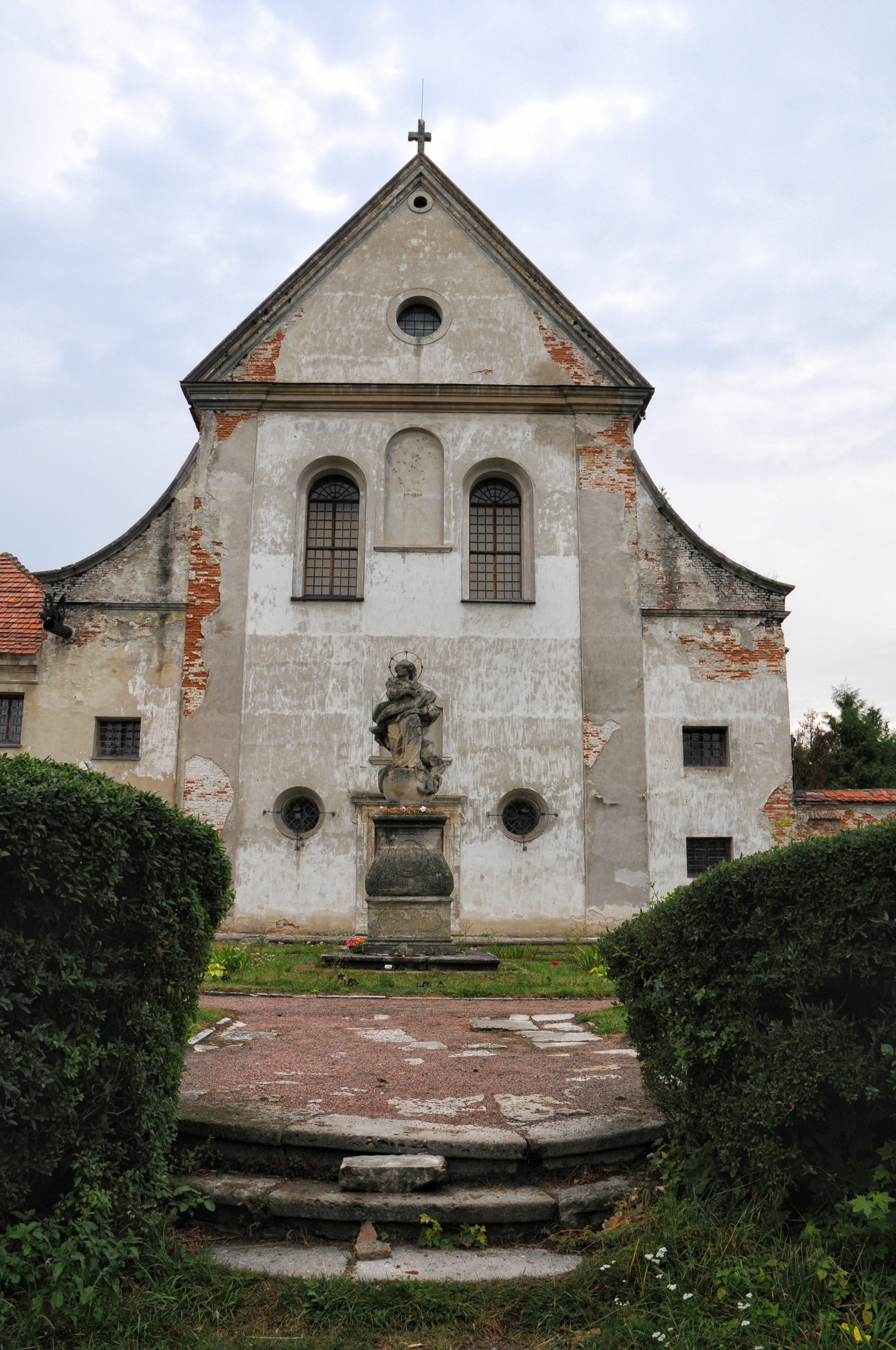 Олесько Костел Св.Йосифа